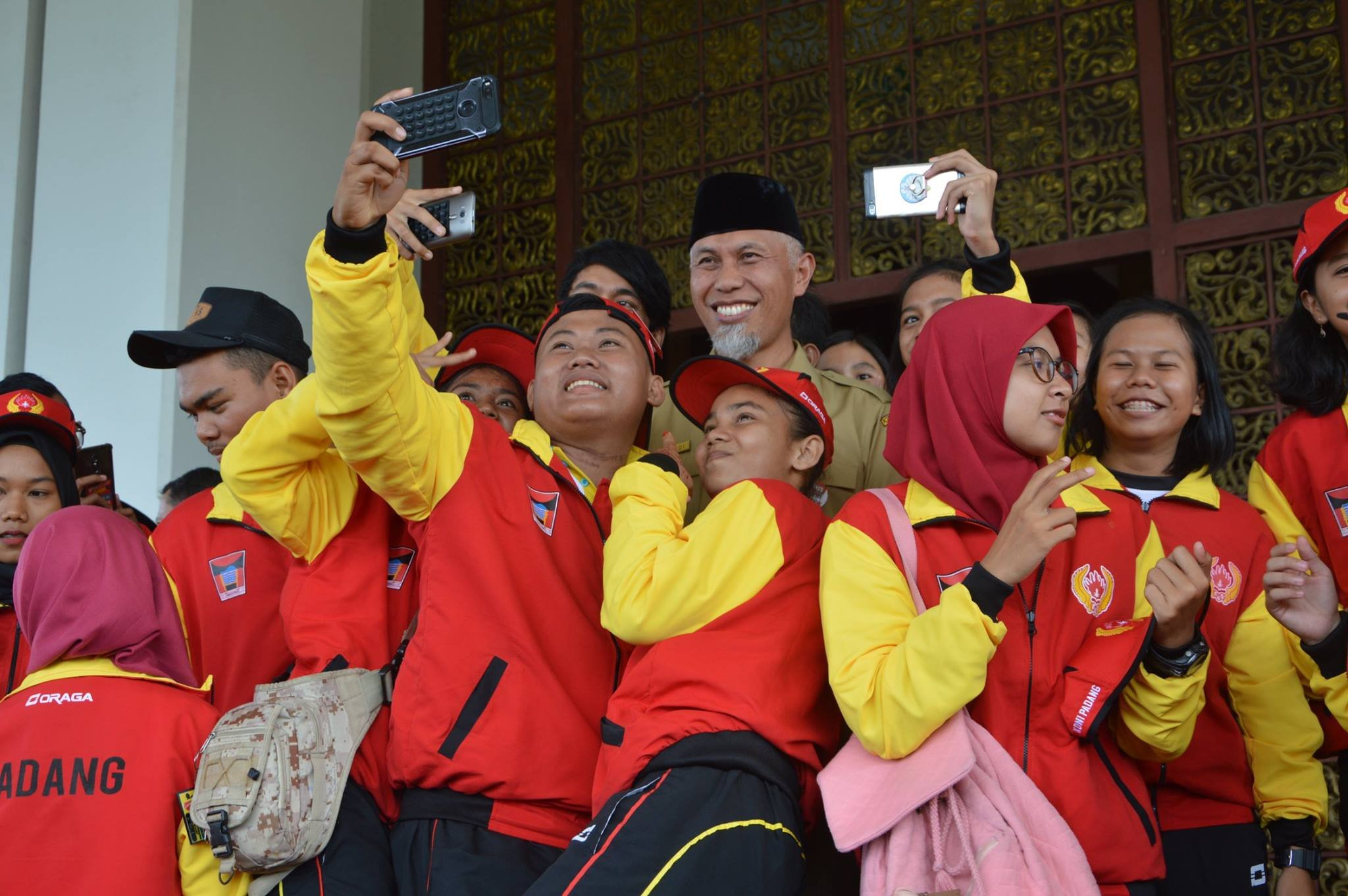 Wali Kota Mahyeldi selfie bersama atlit